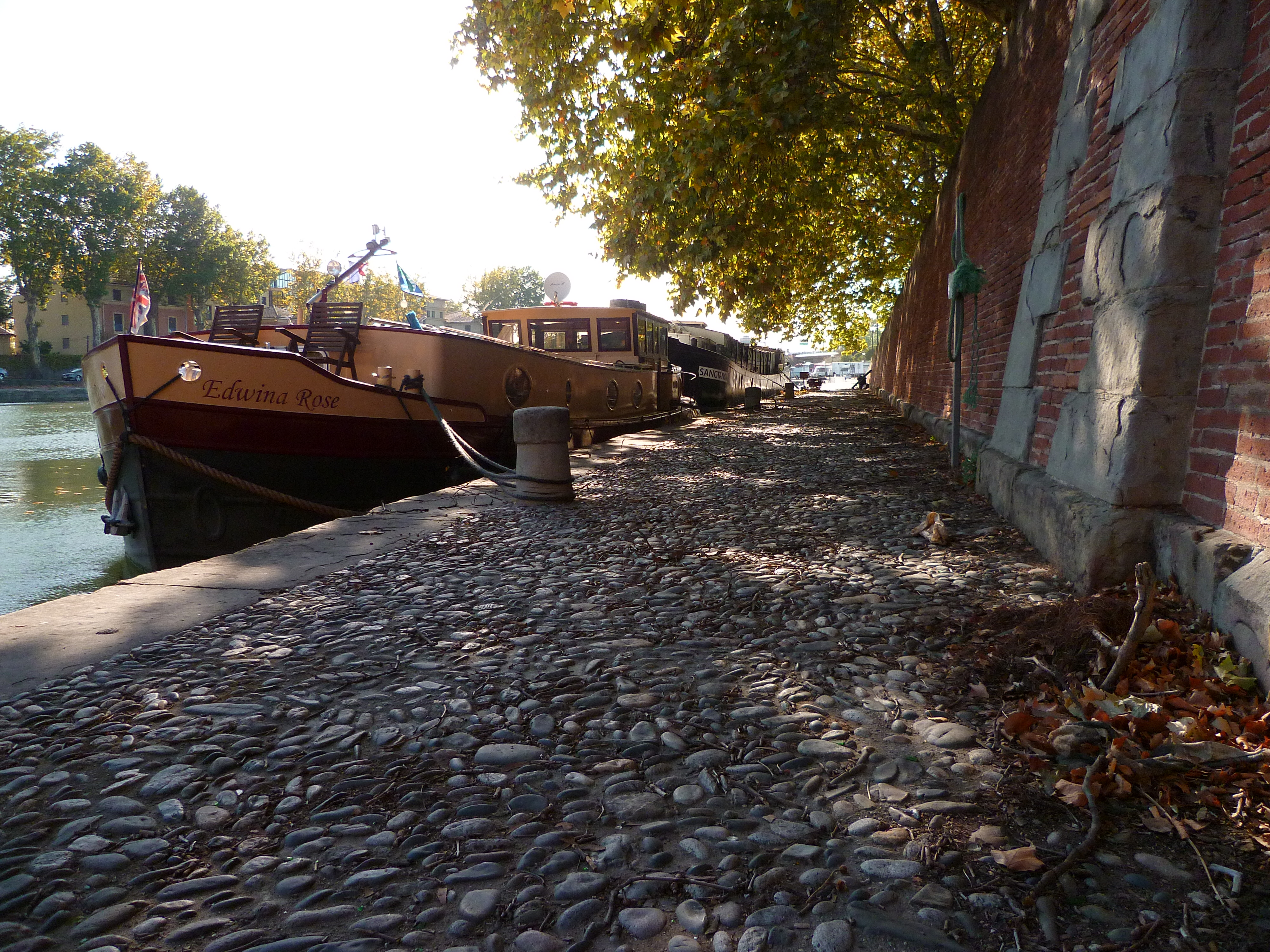 Toulouse (Haute-Garonne, France) : Péniches au Port de l'Embouchure.